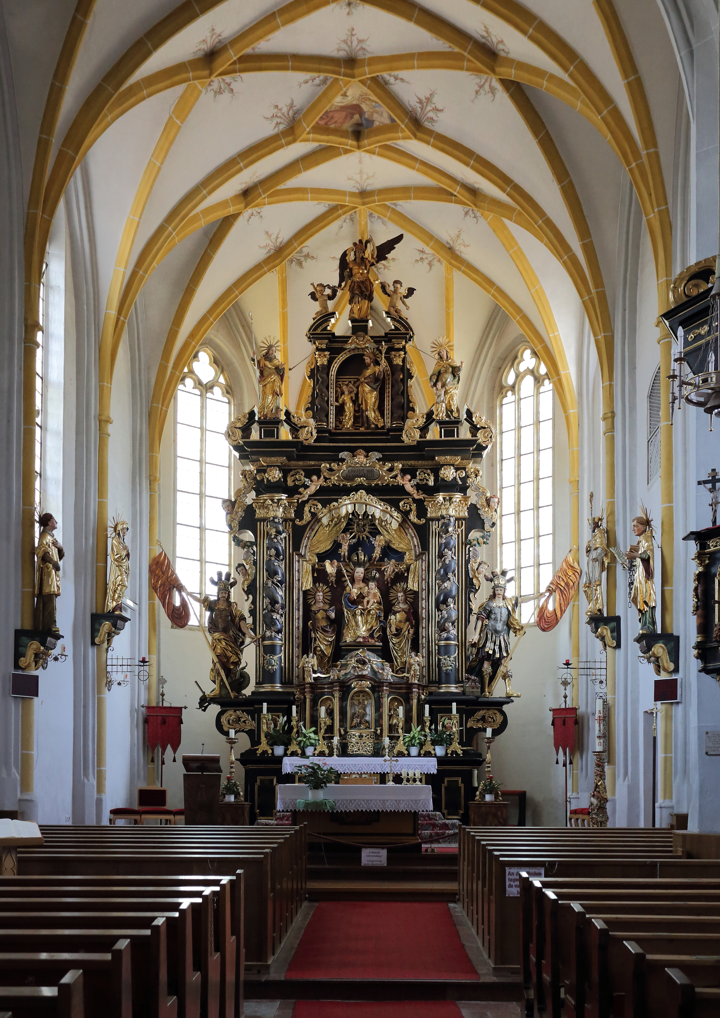 Hochaltar der katholischen Pfarrkirche Mariä Himmelfahrt in der oberösterreichischen Gemeinde Waldzell. Der Hochaltar wurde 1683 unter Verwendung der Statuen der hll. Maria, Barbara und Katharina vom ehemaligen gotischen Flügelaltar von Thomas Schwanthaler errichtet. Bis auf die thronende Muttergottes wurde 1752 der Hochaltar von Franz Matthias Schwanthaler überarbeitet.